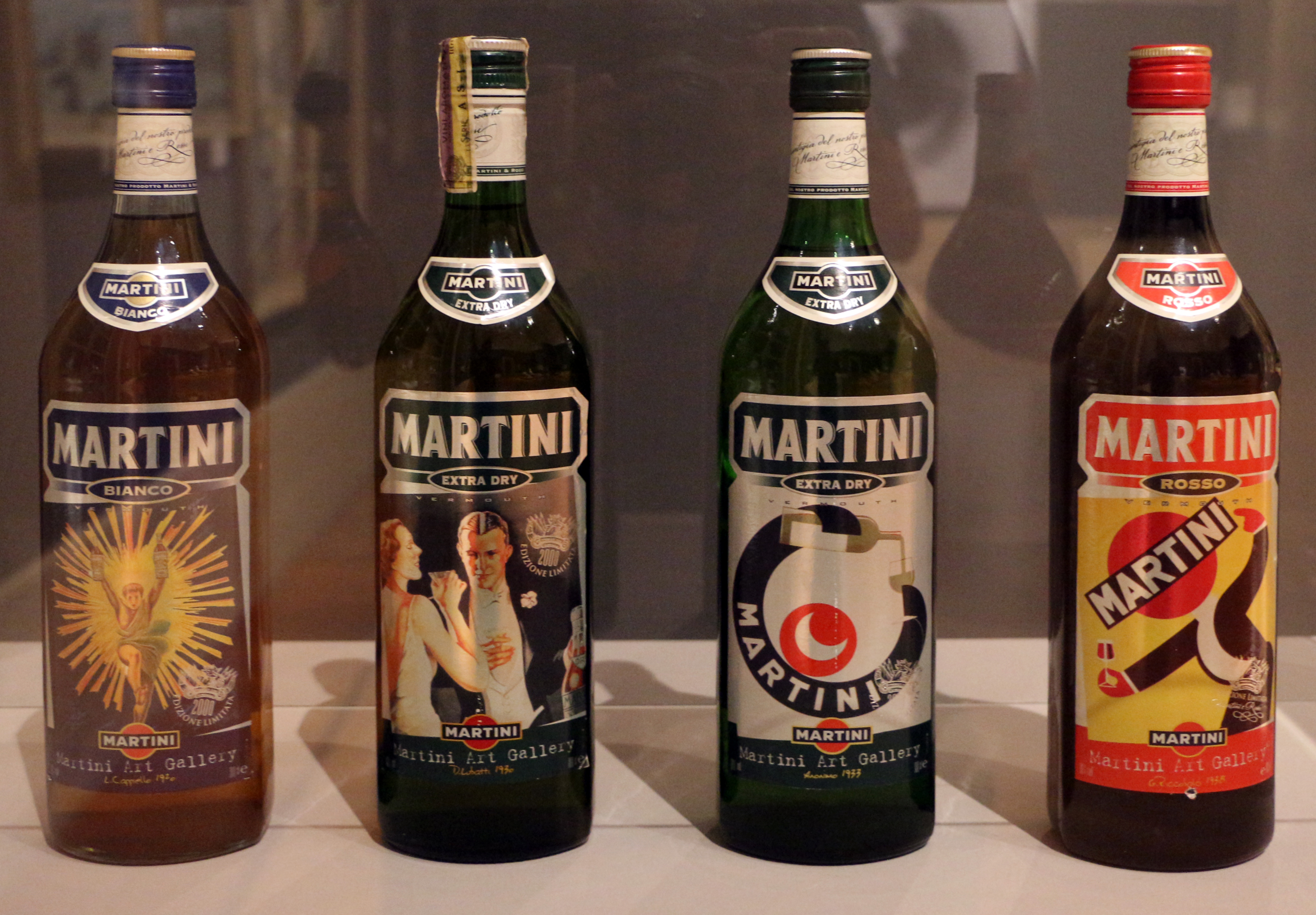 Corporate art exhibition (Galleria nazionale d'arte moderna 2015) This is a photo of a monument which is part of cultural heritage of Italy.